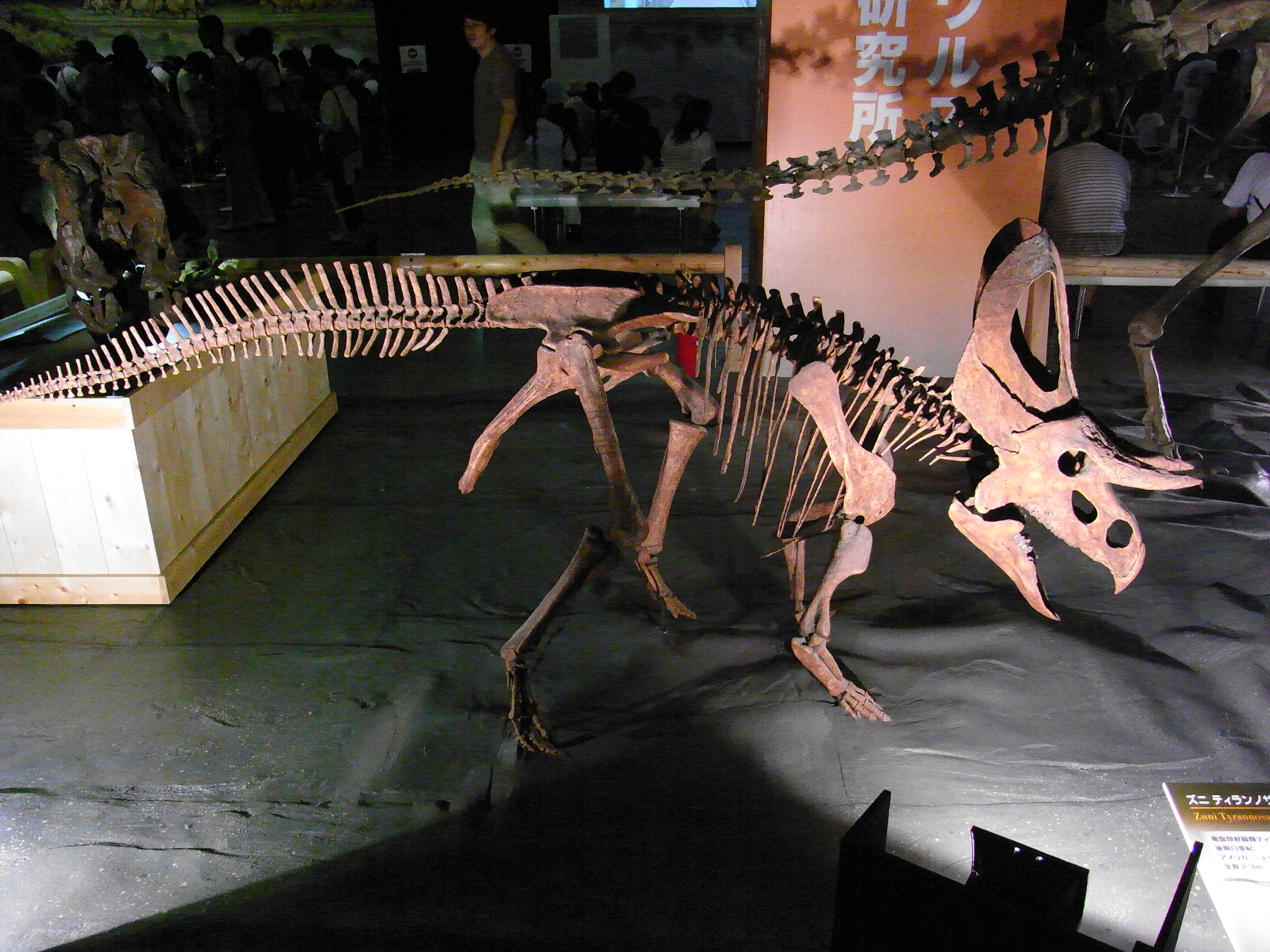 ズニケラ。